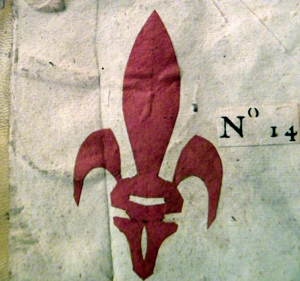 Fleur de Lys rouge, découpée et collée dans un manuscrit du XVIIe siècle.